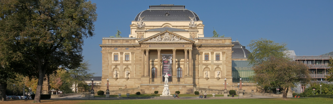 Parkseite des Hessisches Staatstheater Wiesbaden